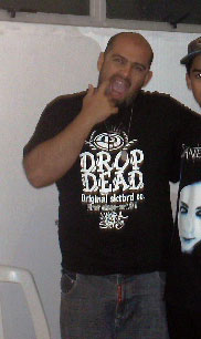 Digão, dos Raimundos, e eu.